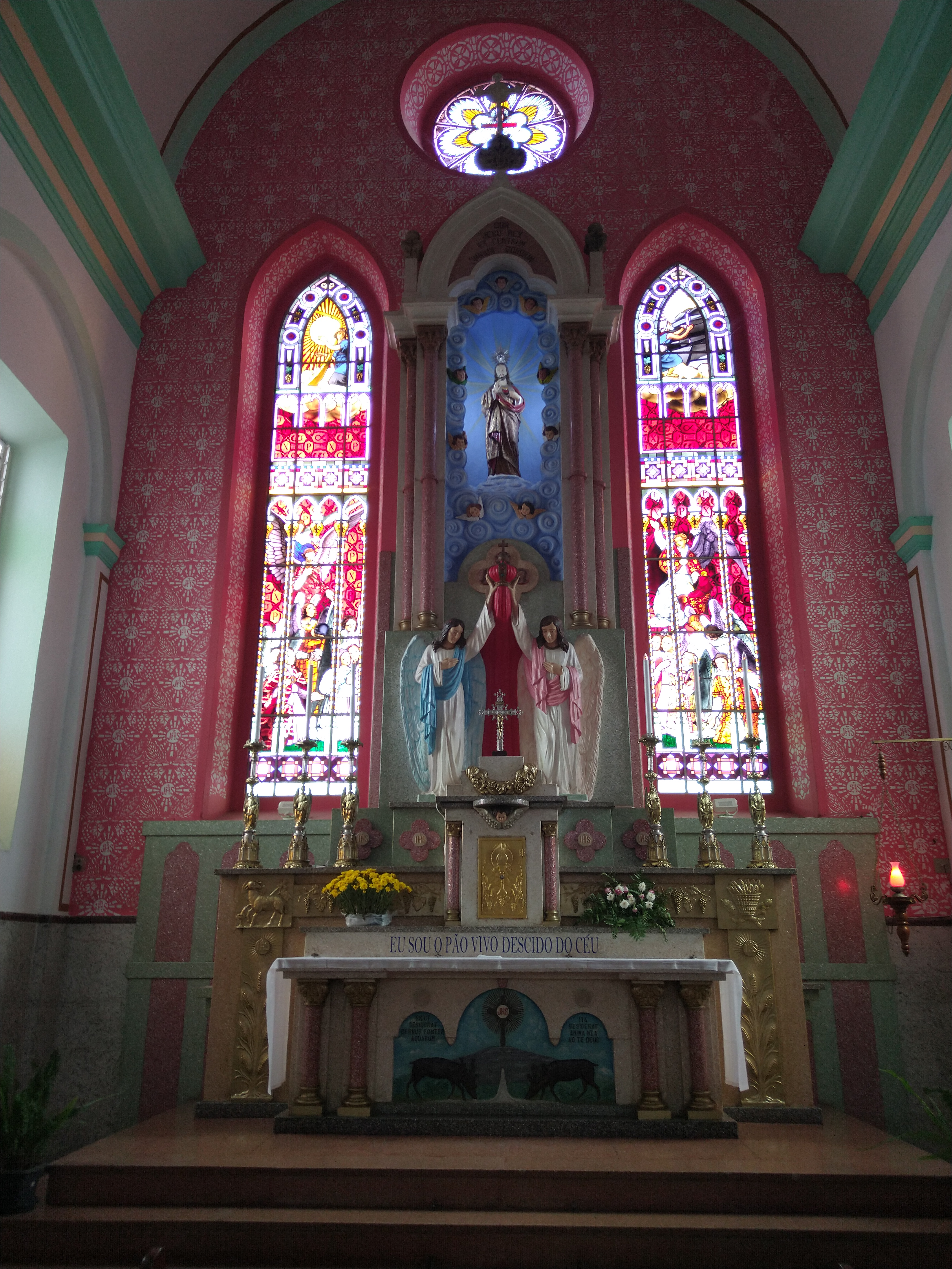 Altar secundário Na lateral